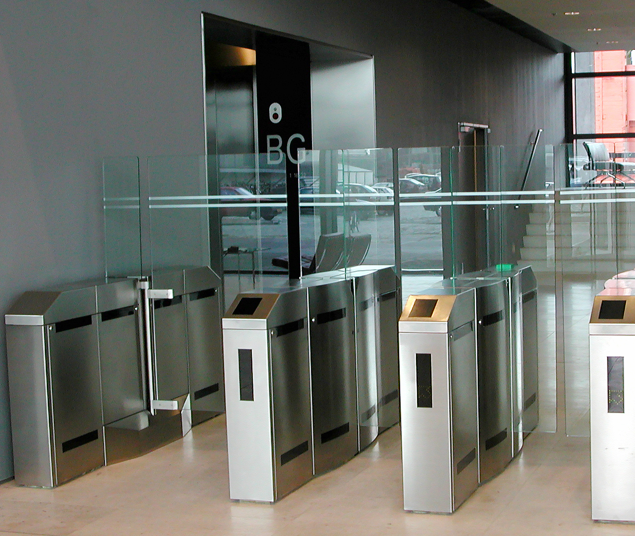 Mivapoort